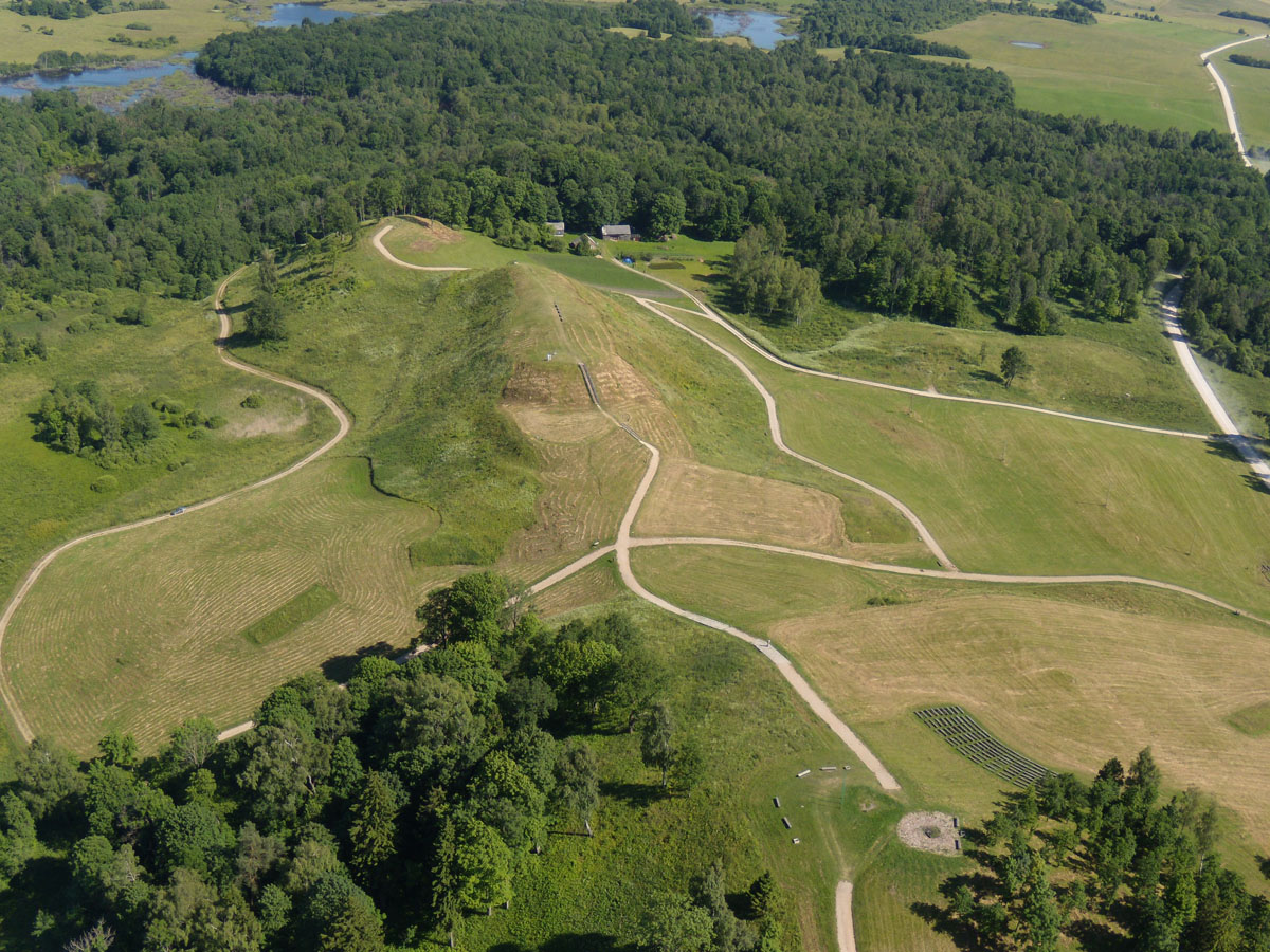 Vaizdas iš viršaus